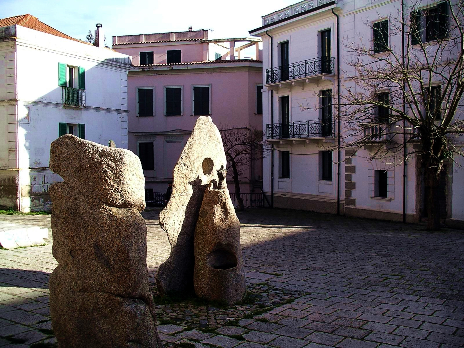 La Piazza Sebastiano Satto con alcune opere dello scultore Costantino Nivola